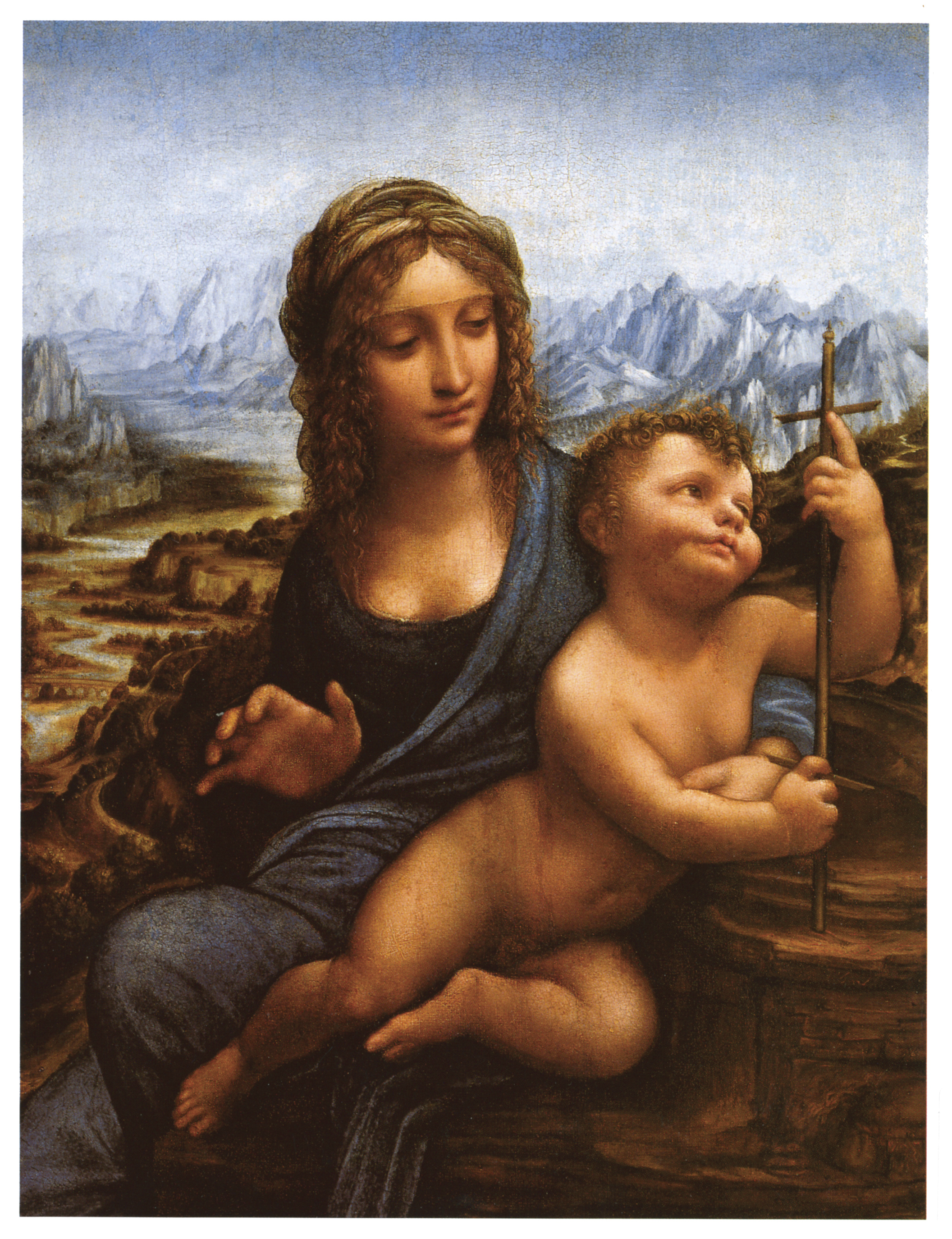 pl: Madonna z kądzielą en: Madonna of the Yarnwinder